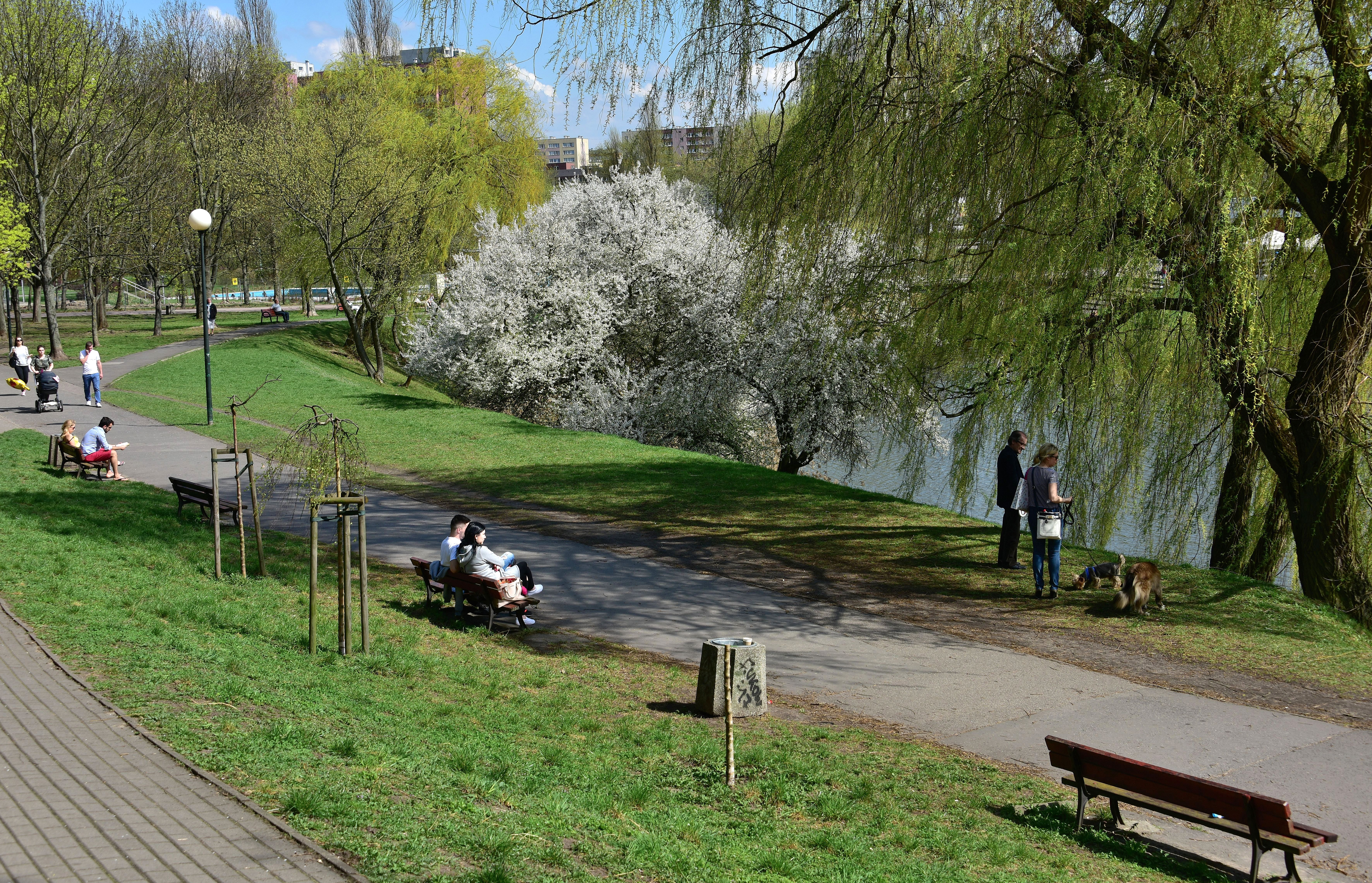 Park Szczęśliwicki w Warszawie